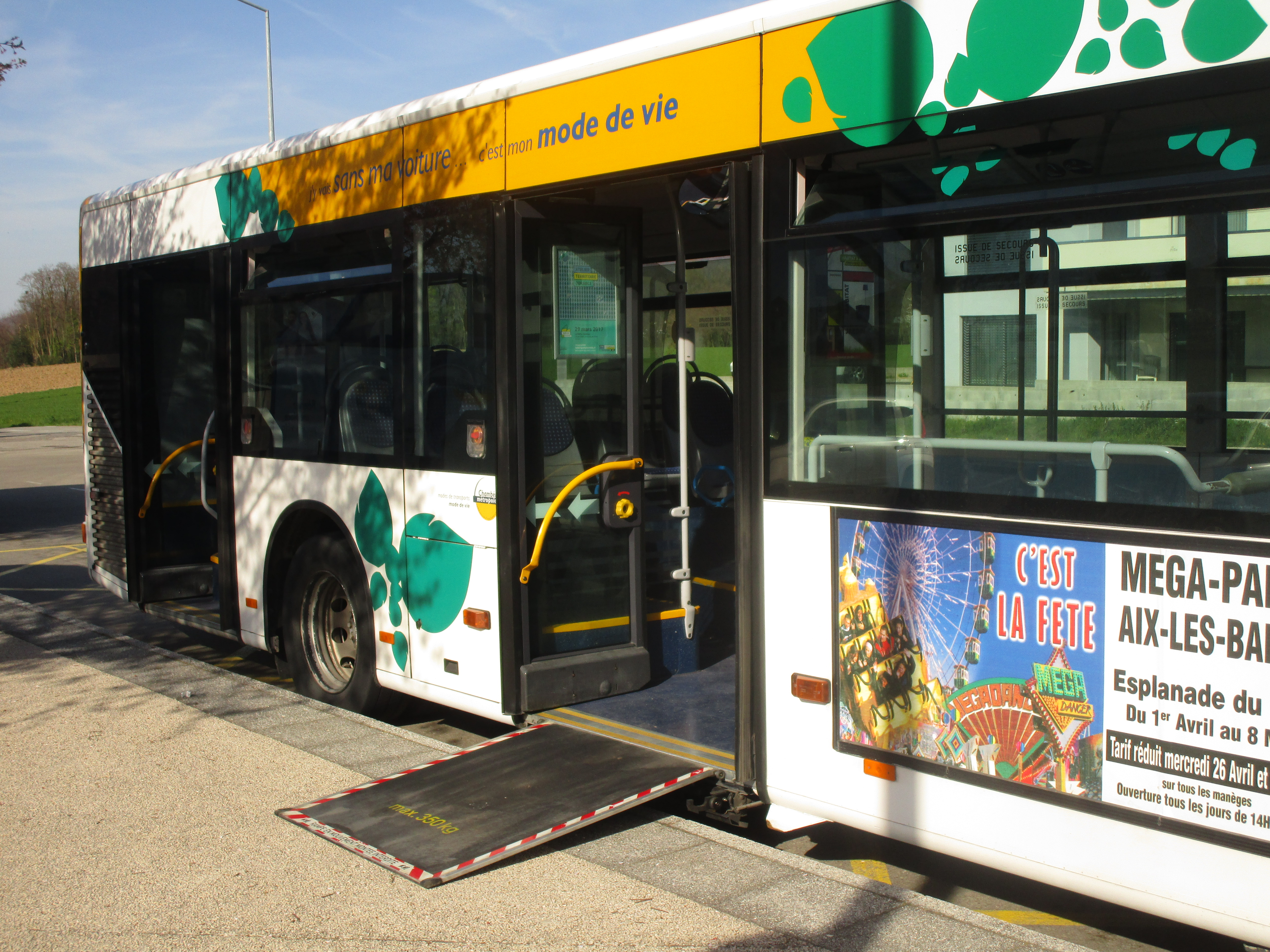 Le bus Mercedes-Benz Citaro C1 n°2014 du Stac avec la rampe d’accès pour les PMR sortie.